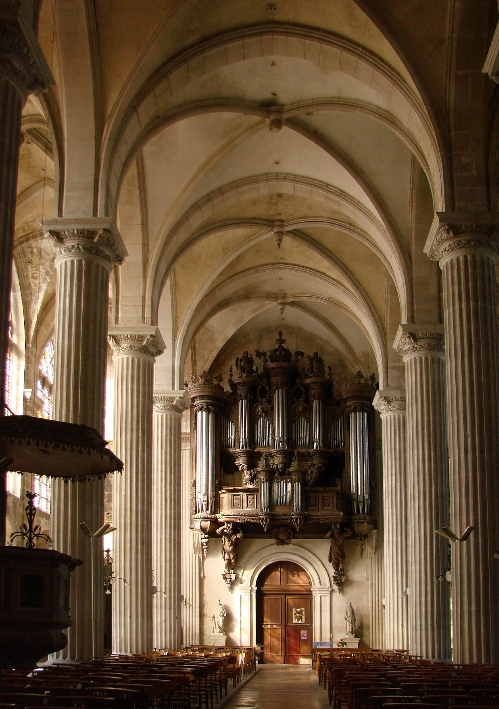 Nef et buffet d'orgues de l'église abbatiale Saint-Michel à Saint-Mihiel, sculpté entre 1679 et 1681.